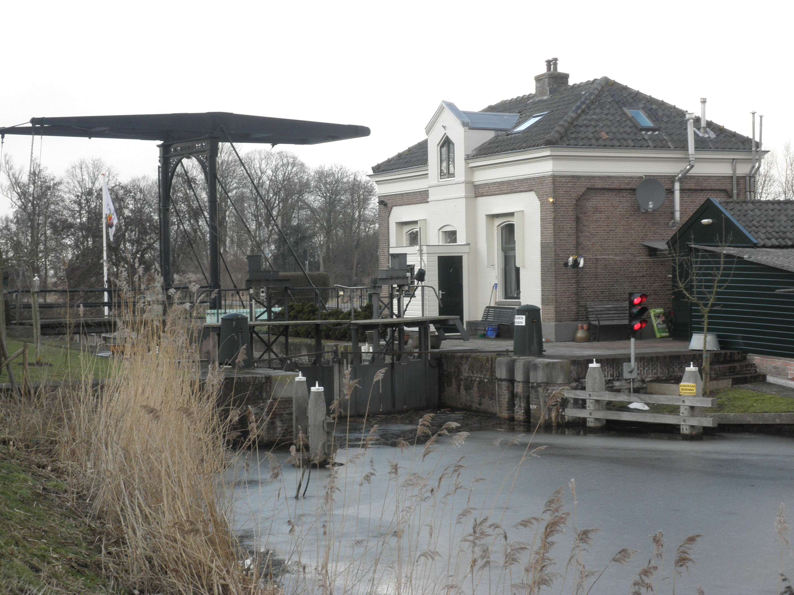 Schusluis tussen de rivier de Vecht en de 's-Gravenlandse vaart, bij Fort Uitermeer. Foto is genomen in de richting van Weesp.